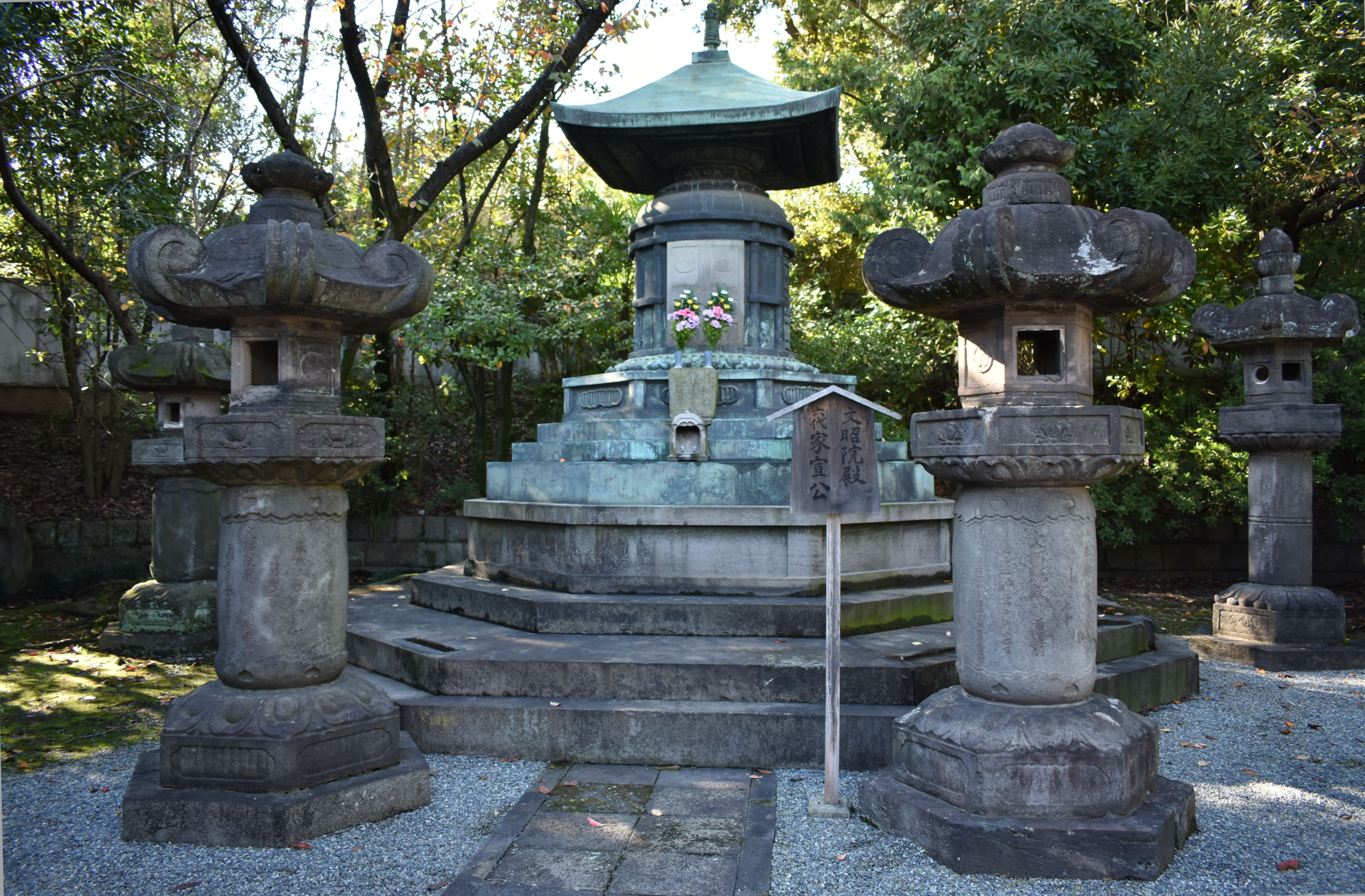 増上寺 御霊屋